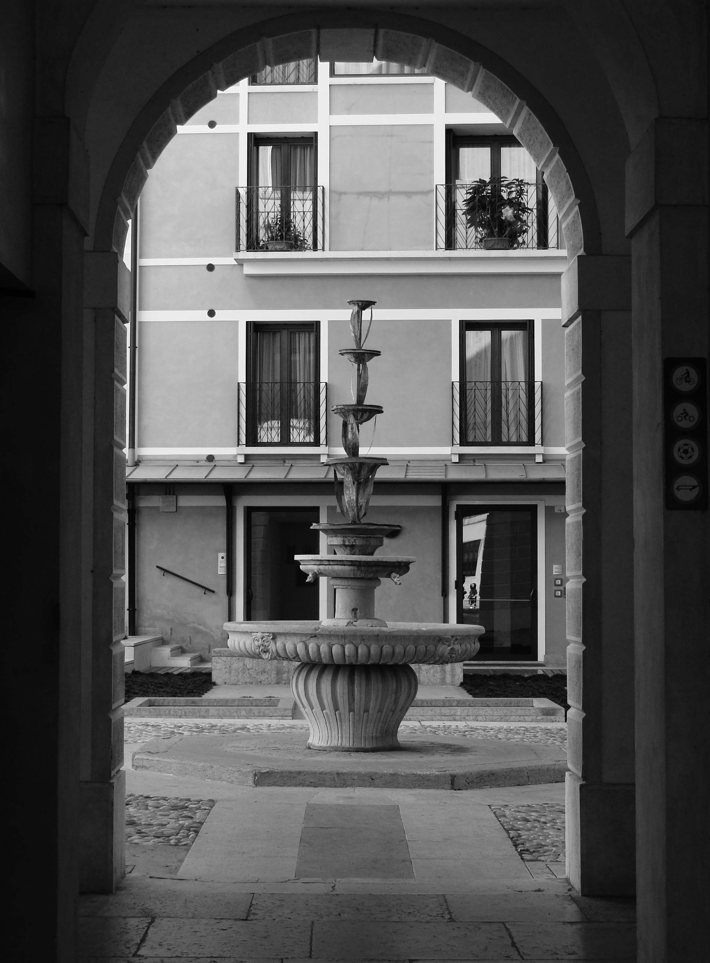 Particolare della decorazione urbana del complesso dell'ex-ospedale di San Leonardo a Treviso